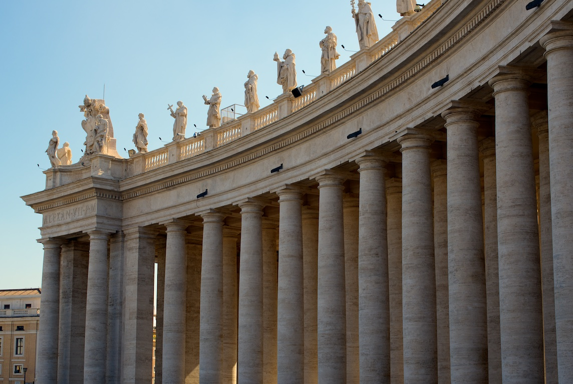 Colonnades in Saint Peter's Square